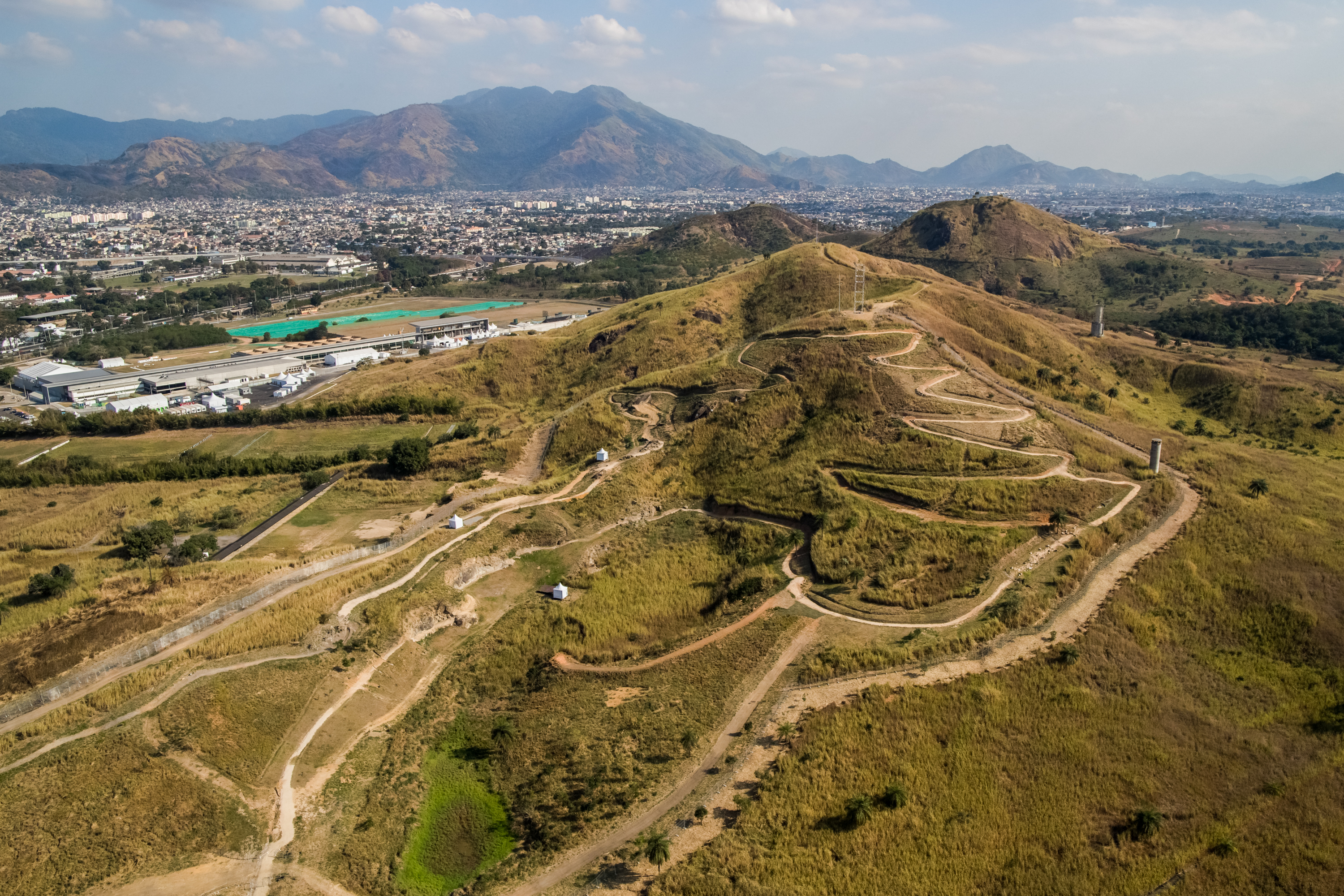 Visão geral de trecho do circuito de mountain bike.